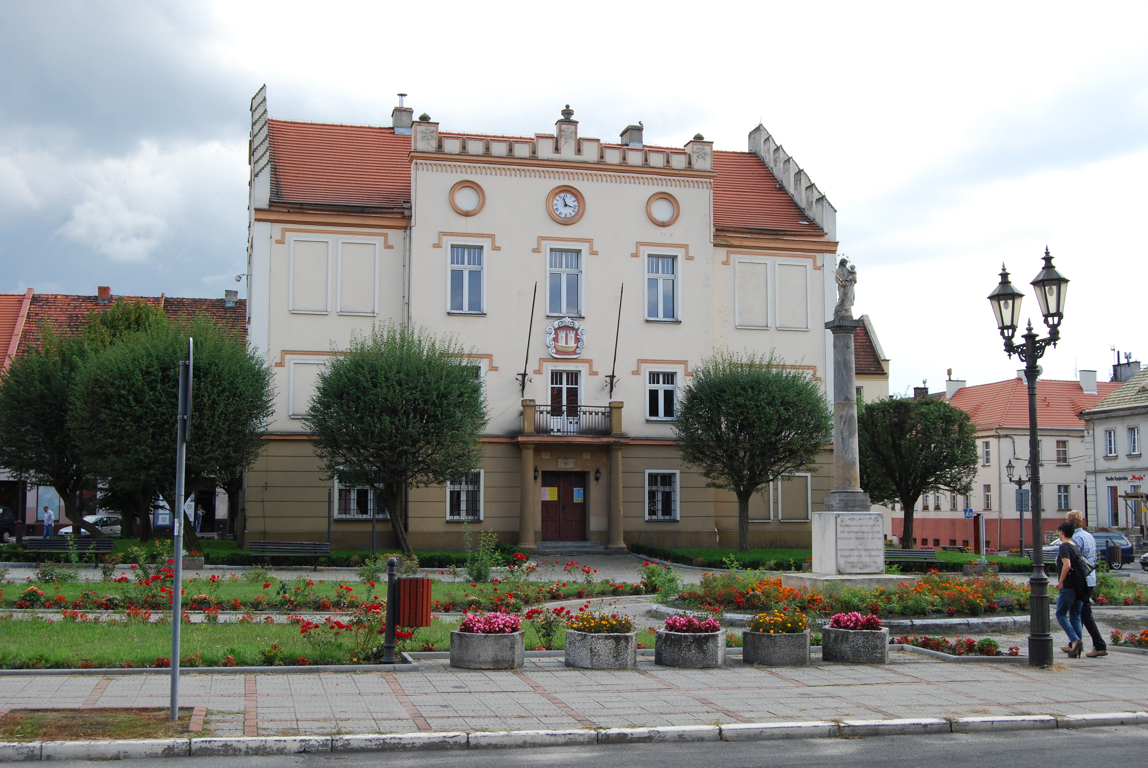 Pyskowice - Ratusz (zabytek nr A/288/60 z 7.03.1960)